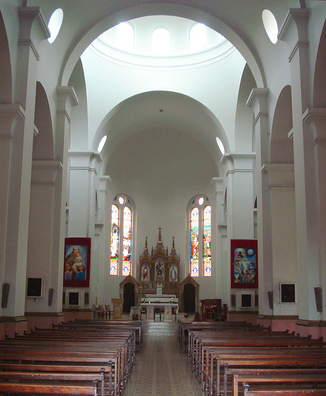 Interior da Igreja de Santo Antônio, Porto Alegre, Brasil.